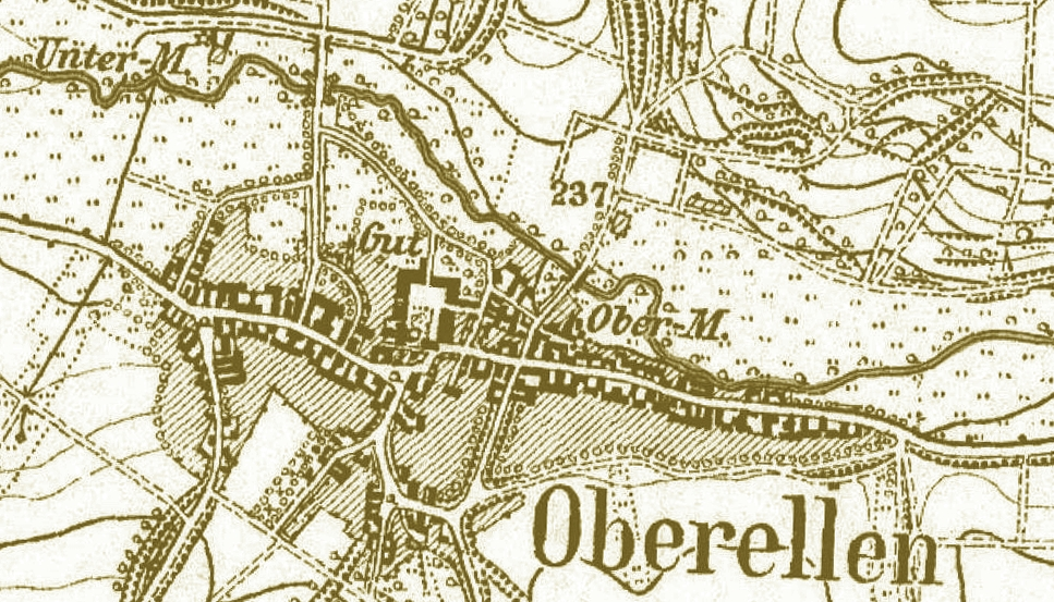 Lage und Ausdehnung der Ortschaft Oberellen.